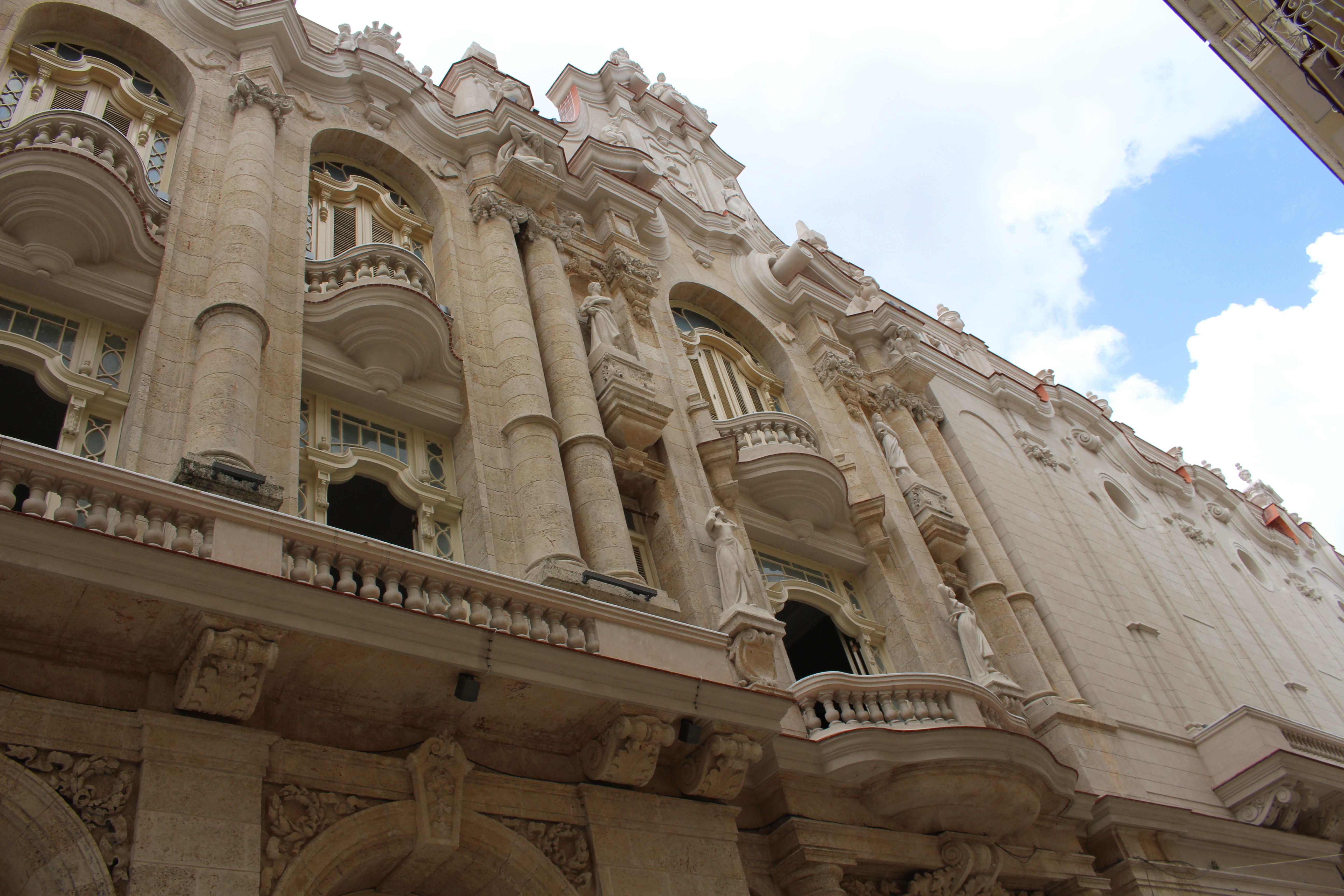 El Gran Teatro de la Habana Alicia Alonso o Gran Teatro de La Habana es un complejo cultural compuesto por varias salas de teatro. Es sede del Ballet Nacional de Cuba, del Teatro Lírico Nacional y del Ballet Español de Cuba. El actual edificio inaugurado en 1915, es obra del arquitecto belga Paul Beleu. En este lugar estuvo emplazado el antiguo teatro Tacón, uno de los más lujosos de América. El teatro, reconstruido dentro del bello edificio, fue durante muchos años el más grande y lujoso del país y por su escenario desfilaron grandes figuras de la ópera, el ballet, la revista musical y la zarzuela.